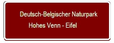 Muster Beschilderung Naturpark, angelehnt an